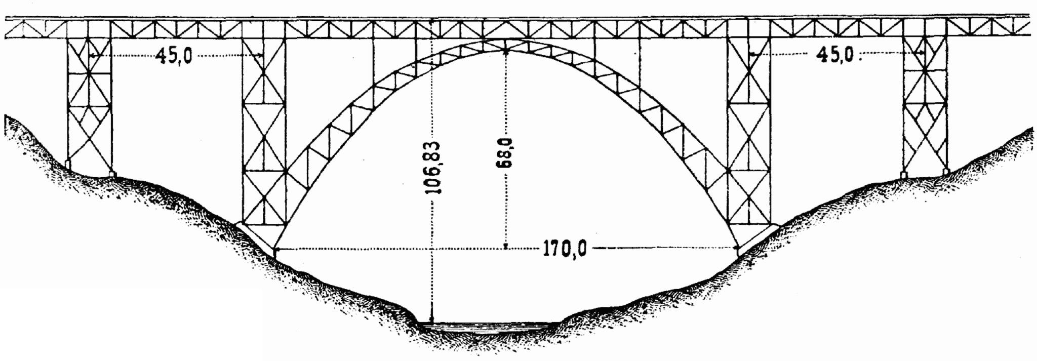 Kaiser-Wilhelm-Brücke über das Wuppertal bei Müngsten.